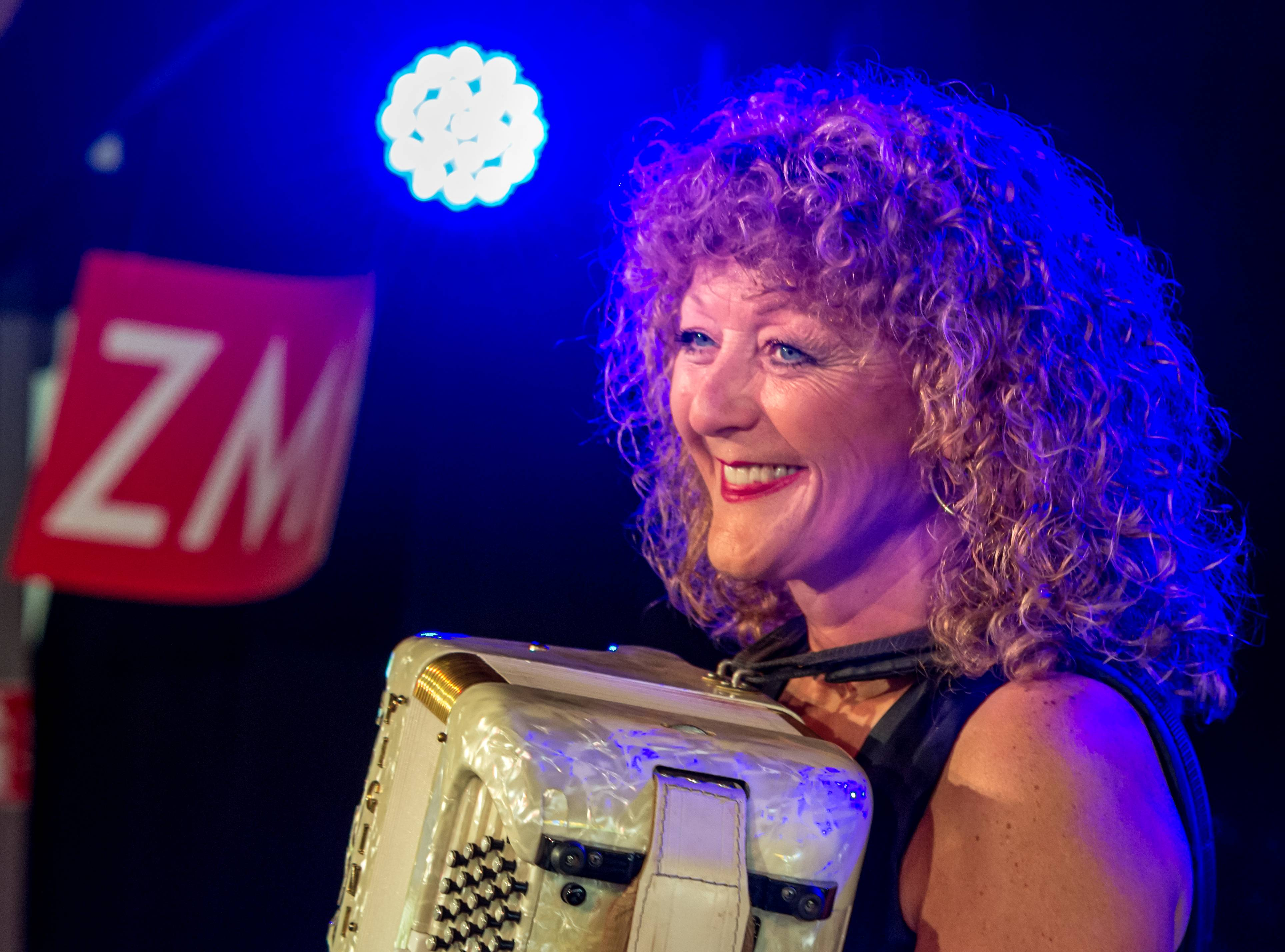 Bilder vom ZMF 2015 Lydie Auvray und die „Auvrettes“ am 15. Juli 2015